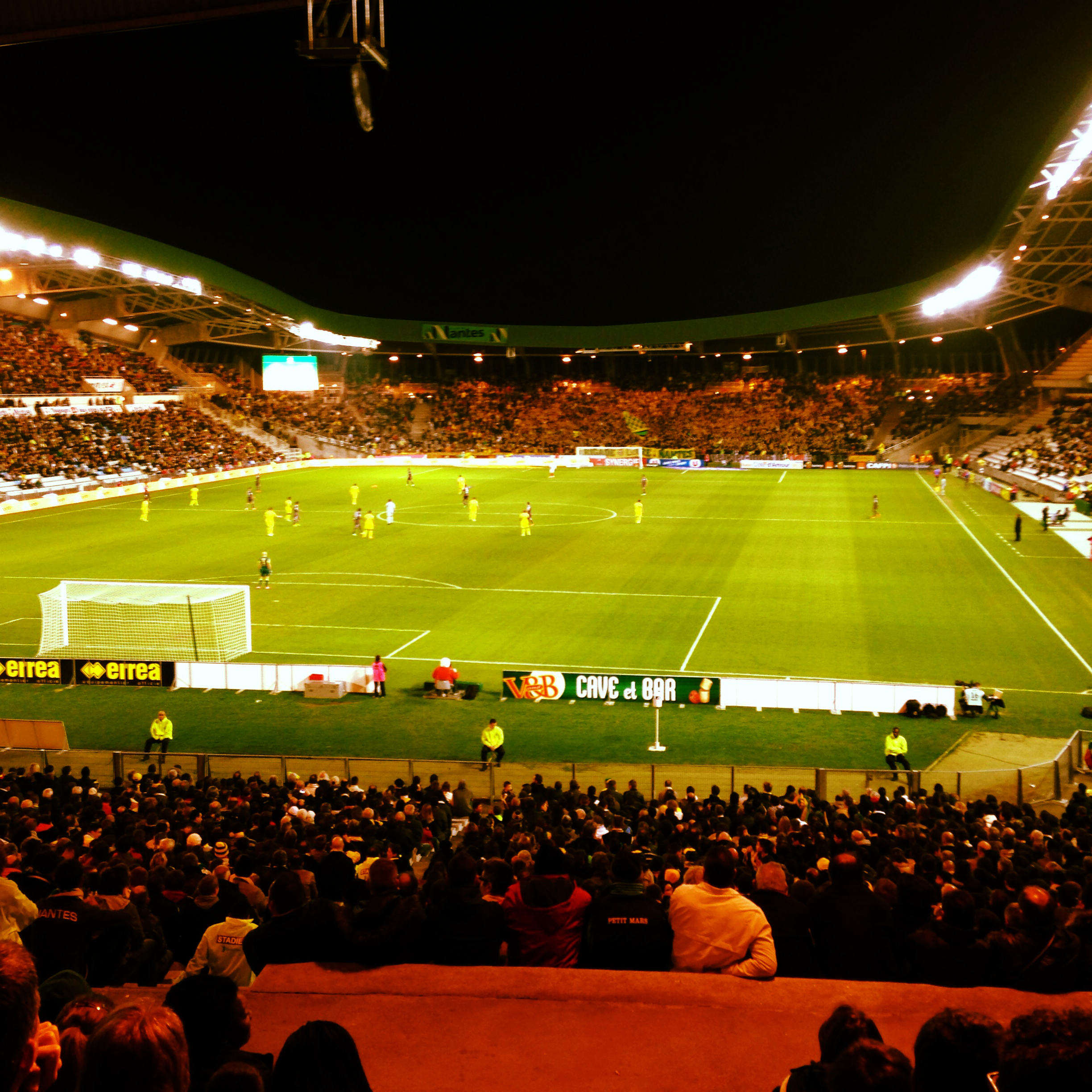 Stade de la beaujoire